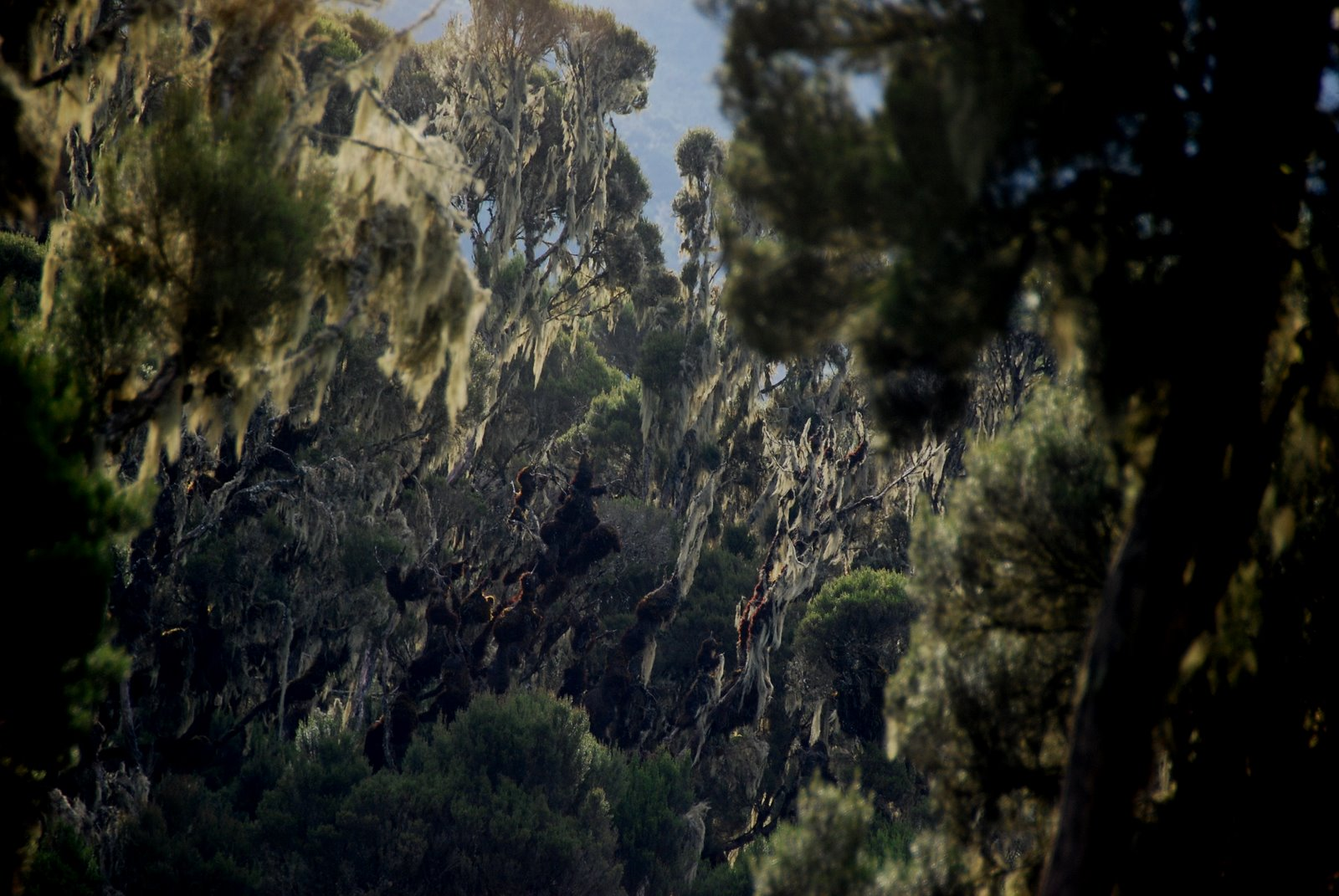 Rwenzorii